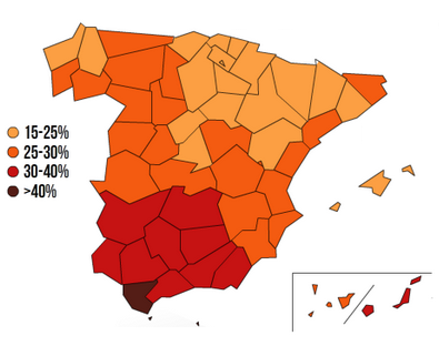 Desempleo en España '15